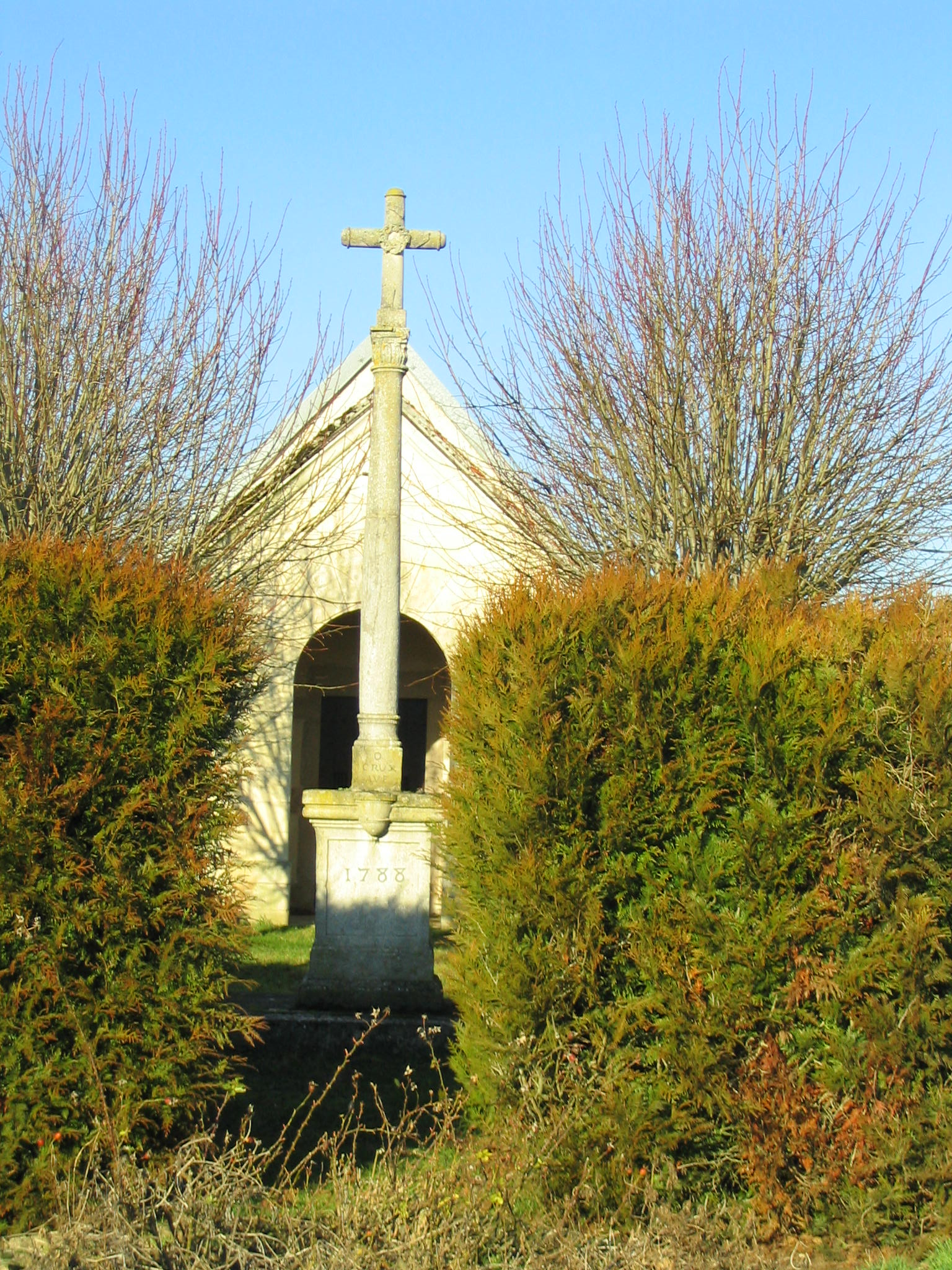 chapelle Ste Anne construite le long de la route Heuilley-Maxilly en 1780